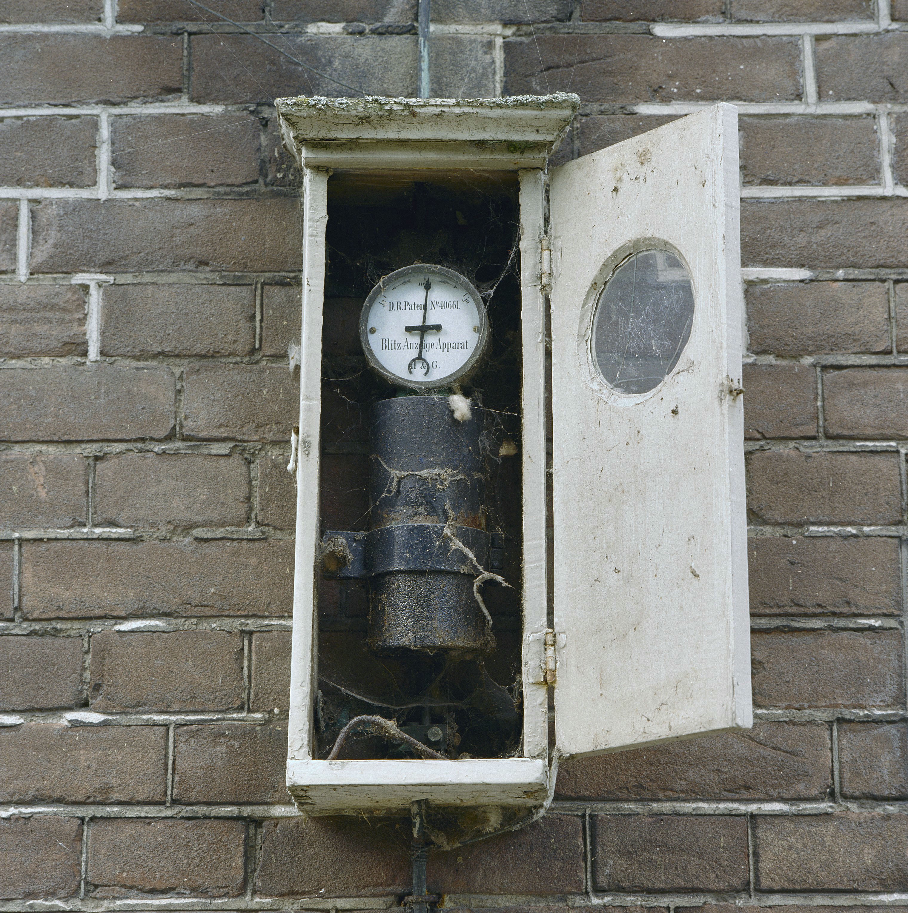 Snouck van Loosenhuis: Rechter zijgevel, kastje met bliksemafleider uit 1892